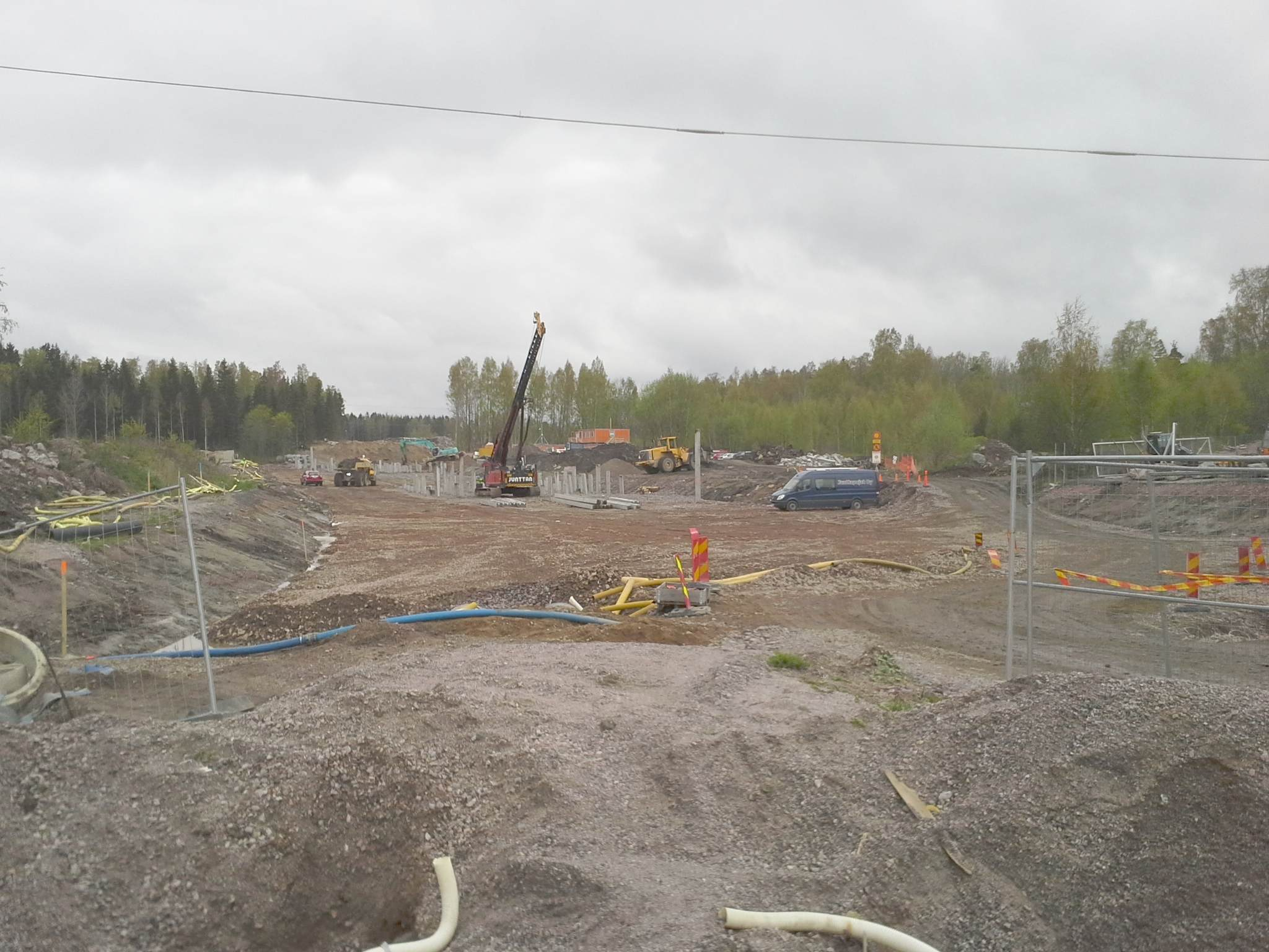 Turveradantie rakenteilla toukokuussa 2014